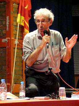 Conferencia de Daniel Bensaïd en Barcelona en abril del 2008.